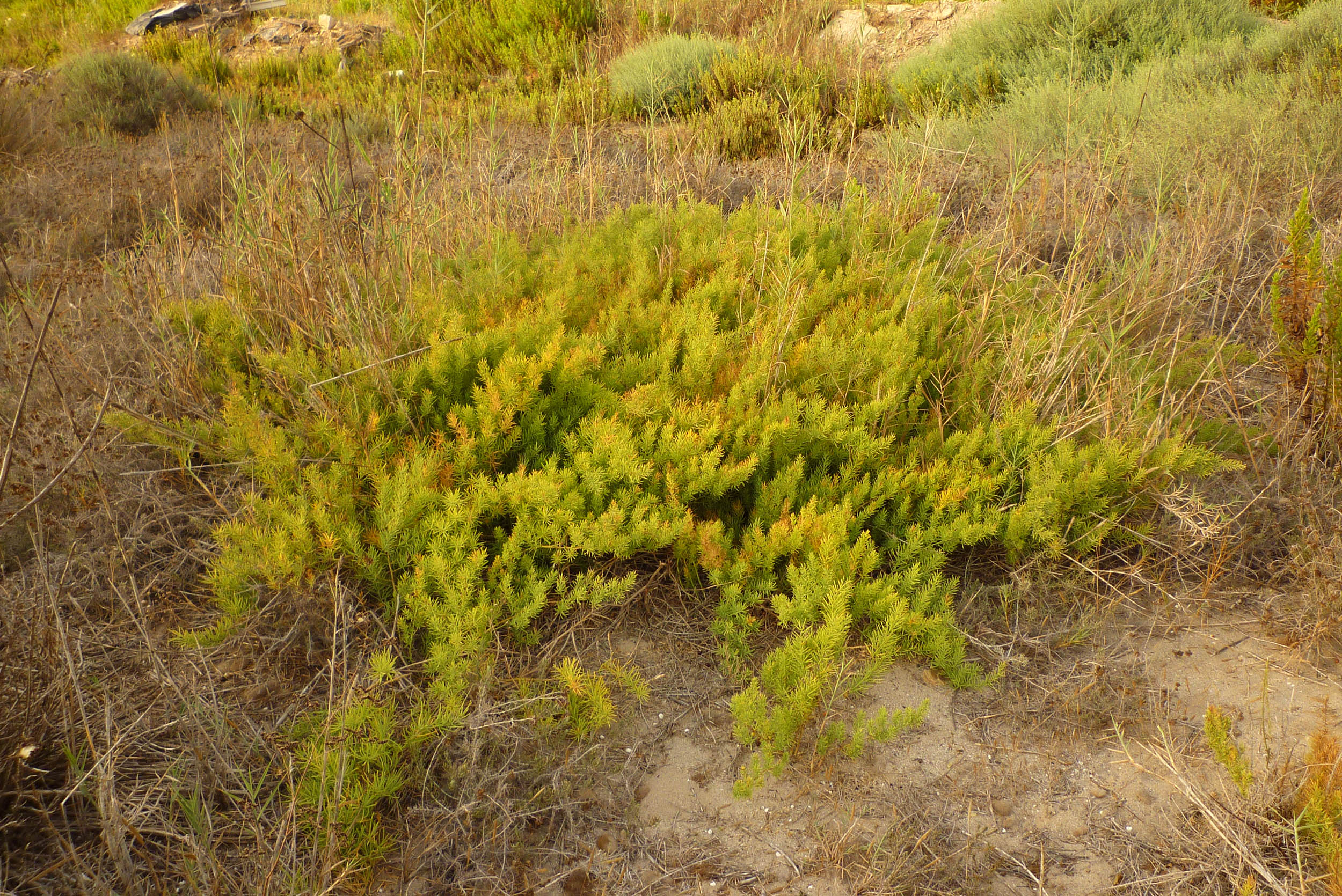 Asparagus macrorrhizus en La Manga del Mar Menor, Región de Murcia, España.